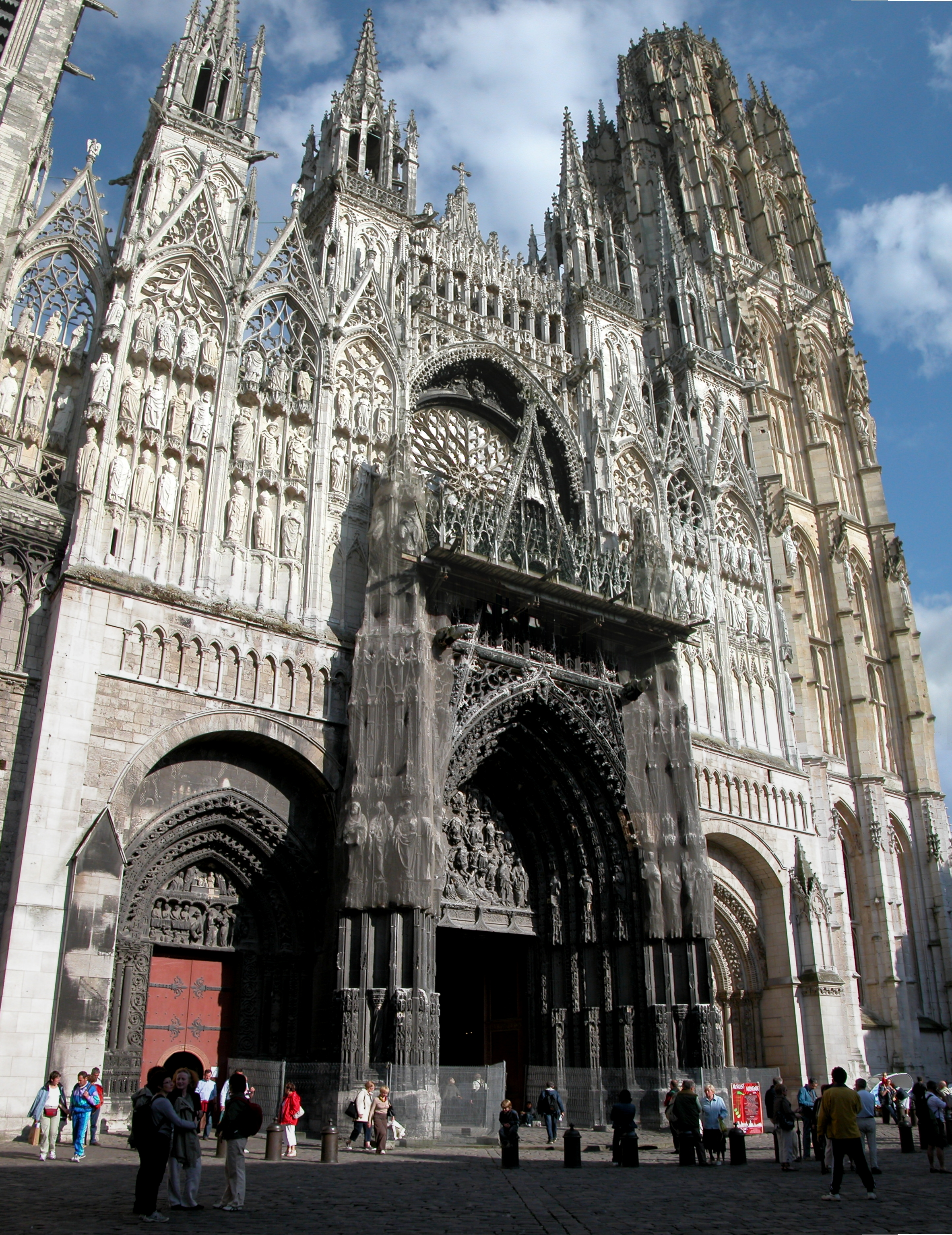 Vue générale de la cathédrale de Rouen